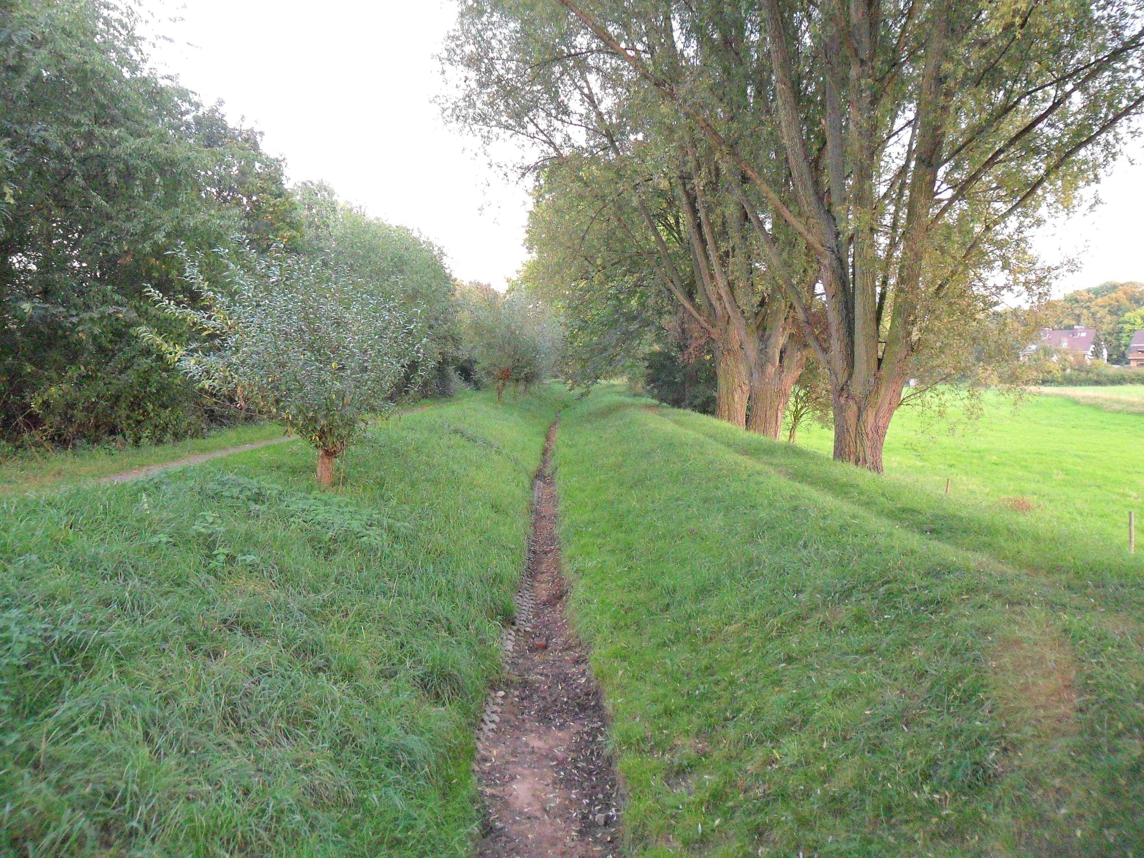 Vilicher Bach bei km 1.45 während einer Trockenperiode im September